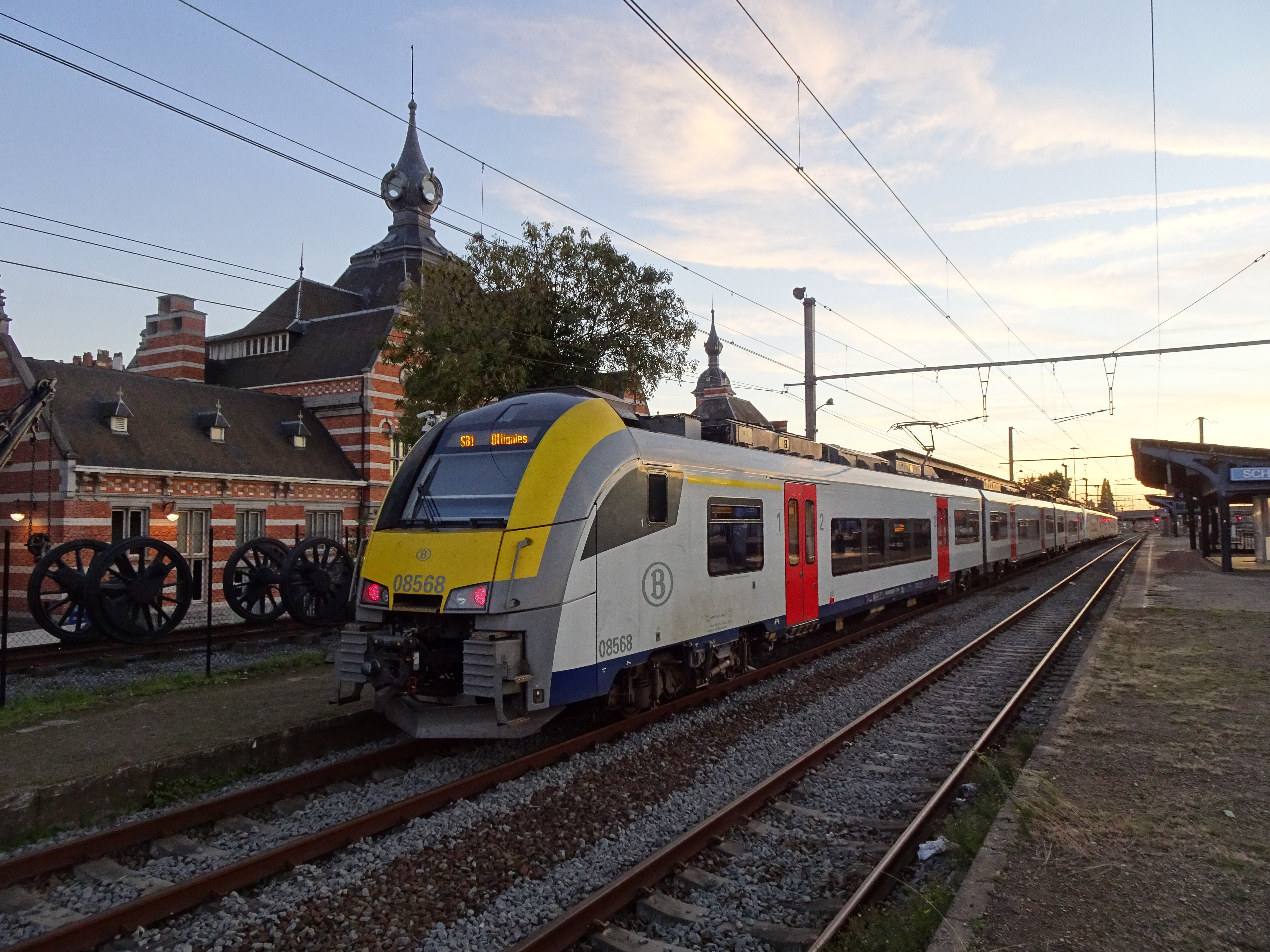 Une paire d'AM 08 attend le départ en gare de Schaerbeek. Elles assureront un train S81 à destination d'Ottignies